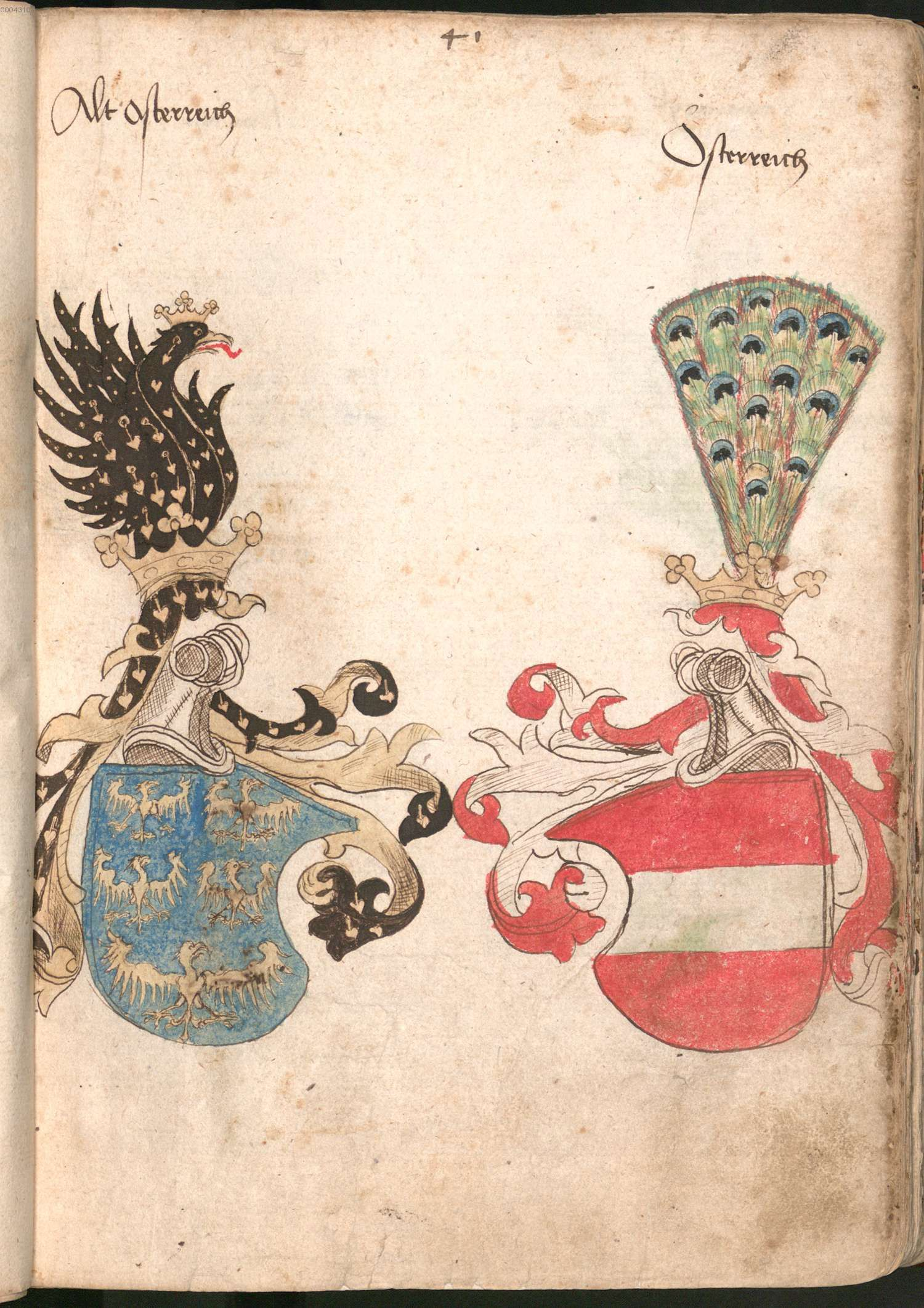 „Wernigeroder (Schaffhausensches) Wappenbuch“; Süddeutschland 4. Viertel 15. Jh. Bayerische Staatsbibliothek München, Cod.icon. 308 n Wappen Altösterreich (Lerchenwappen), Österreich (Bindenschild)